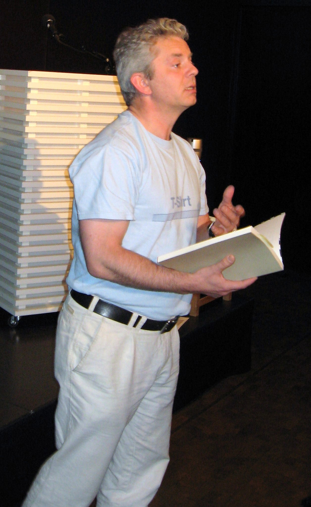 leste fra egne verk.